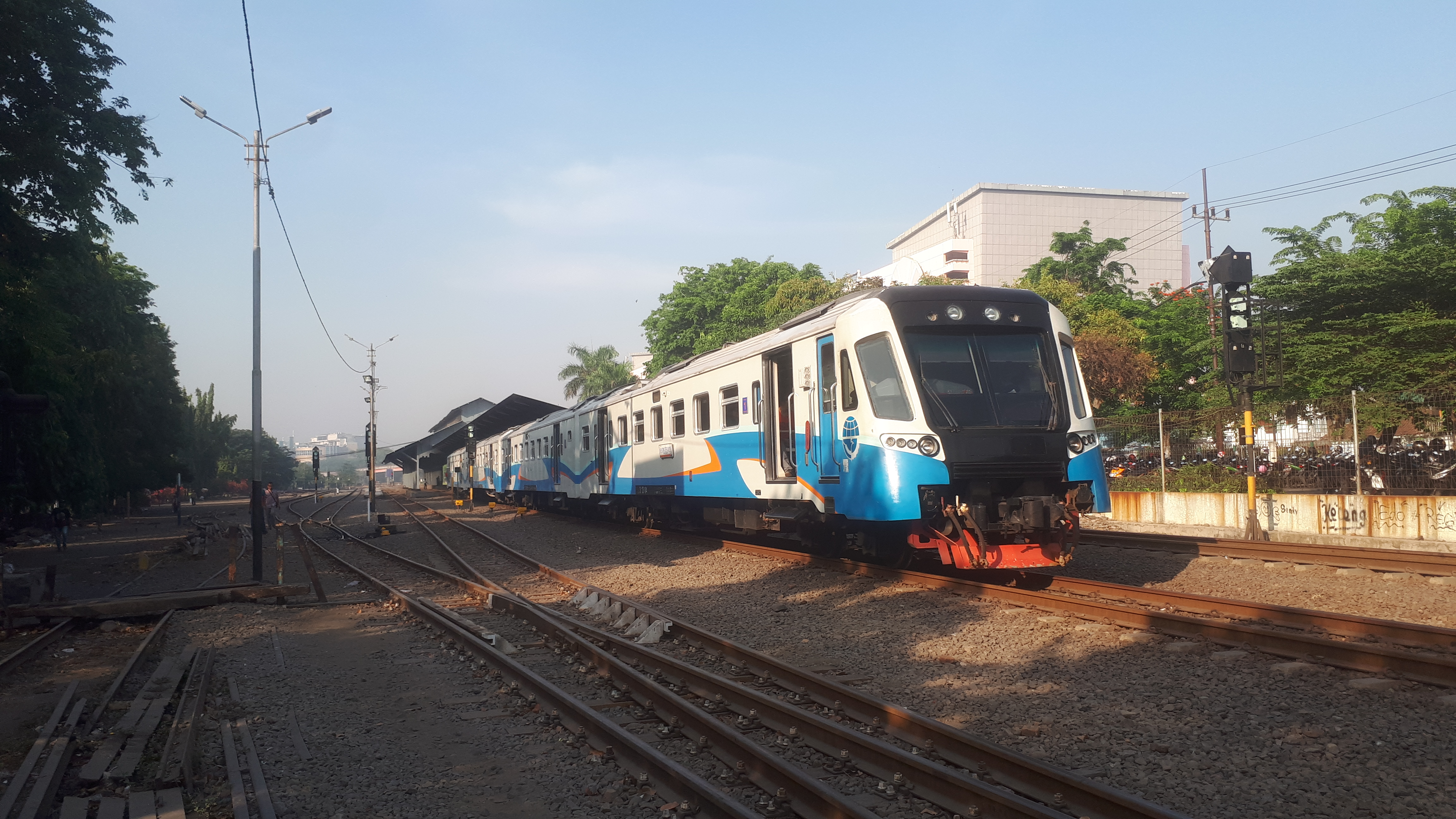 Kereta api Komuter Surabaya-Porong saat meninggalkan Stasiun Wonokromo